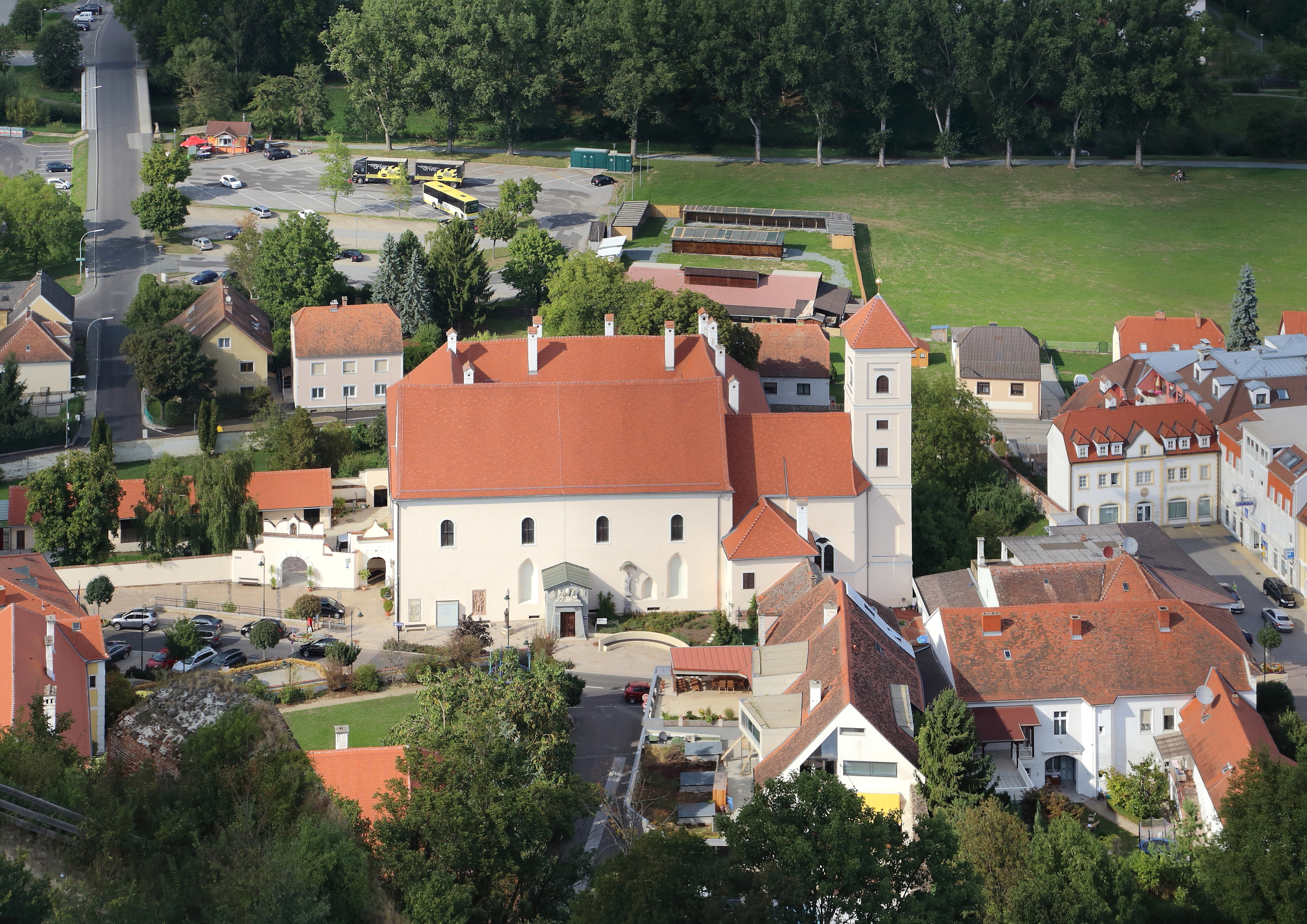 Der Franziskanerklosterkomplex in der burgenländischen Bezirkshauptstadt Güssing von der Burg aus gesehen. Im Vordergrund die Klosterkirche Mariae Heimsuchung und dahinter an diese angebaut ein Dreiflügelbau. Errichtet in der Mitte des 17. Jahrhunderts.